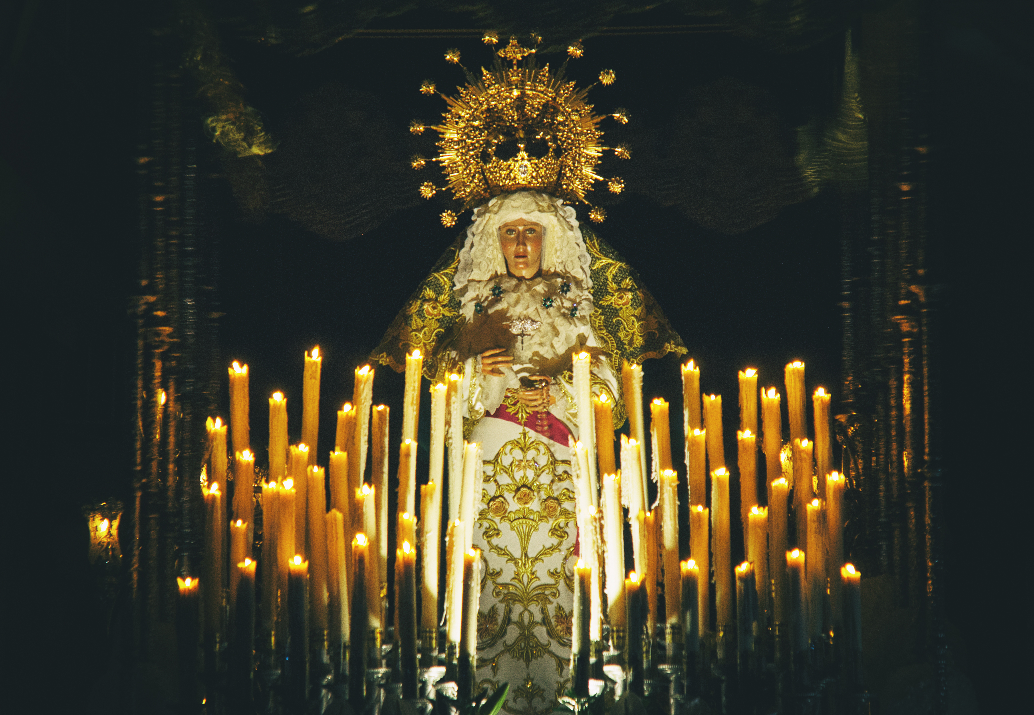 Procesión del Jueves Santo de la Virgen Nuestra Señora de los Dolores en la Semana Santa de Callosa de Segura. This is a photography of a Folklore festival in Spain (Wikidata id Q23662985).